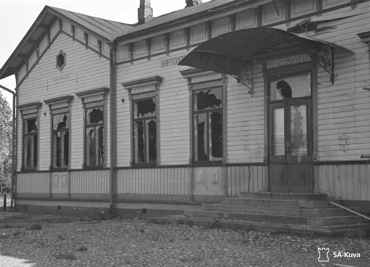 Вяртсиля